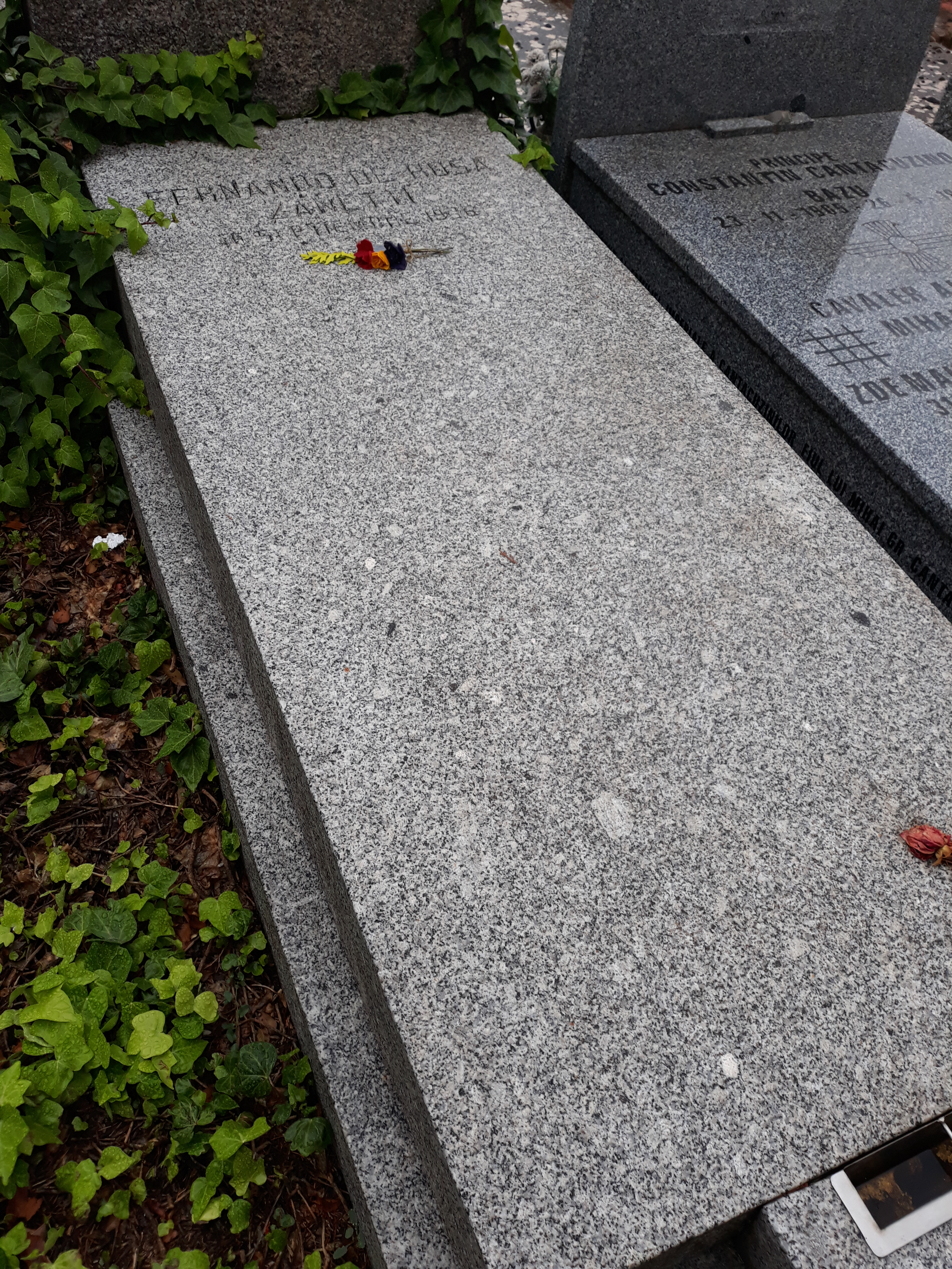 Das Grab des italienischen Sozialisten Francesco de Rosa Zanetti auf dem Cementerio Civil de Madrid.